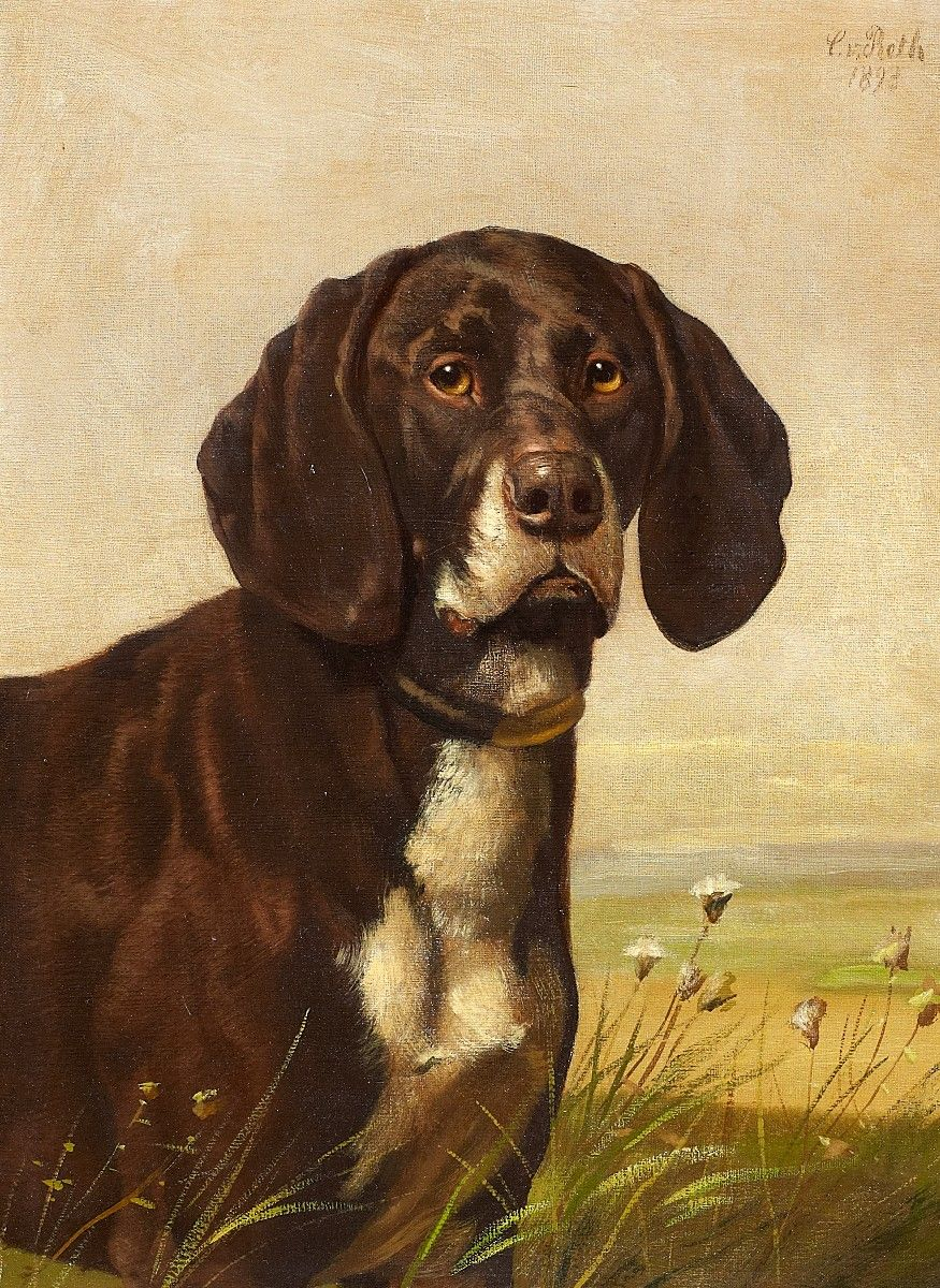 Hundeporträt. Signiert C.v. Reth 1893. Öl auf Leinwand. 52 x 40 cm